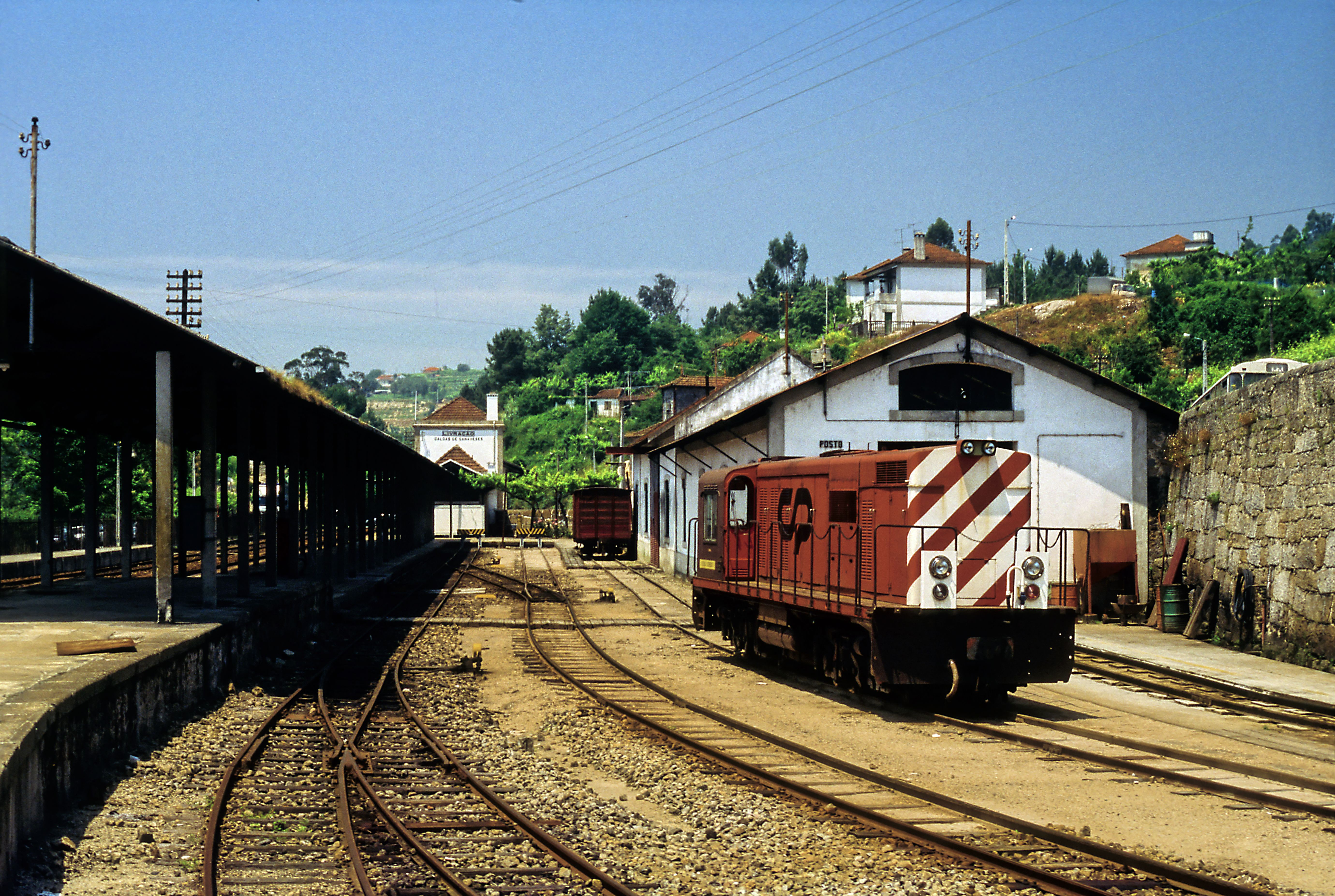 Meterspurseite, Richtung Gleisabschluss.